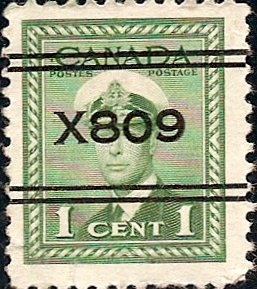 Timbre préoblitéré du Canada Moncton NB 5-239